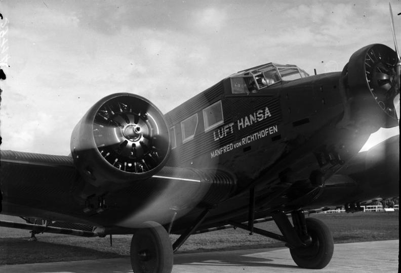 Das Regierungsflugzeug des Preußischen Ministerpräsidenten Hermann Göring "Manfred von Richthofen"